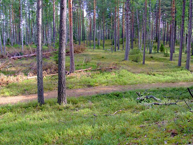 Алоль